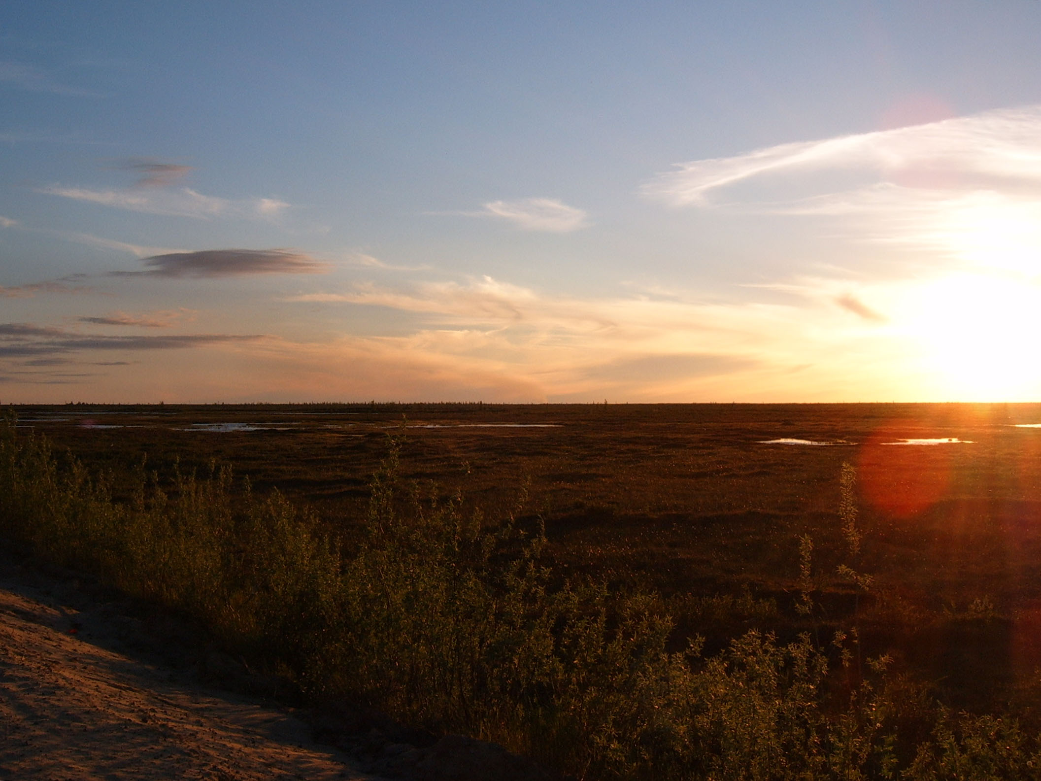 Mitternachtssonne